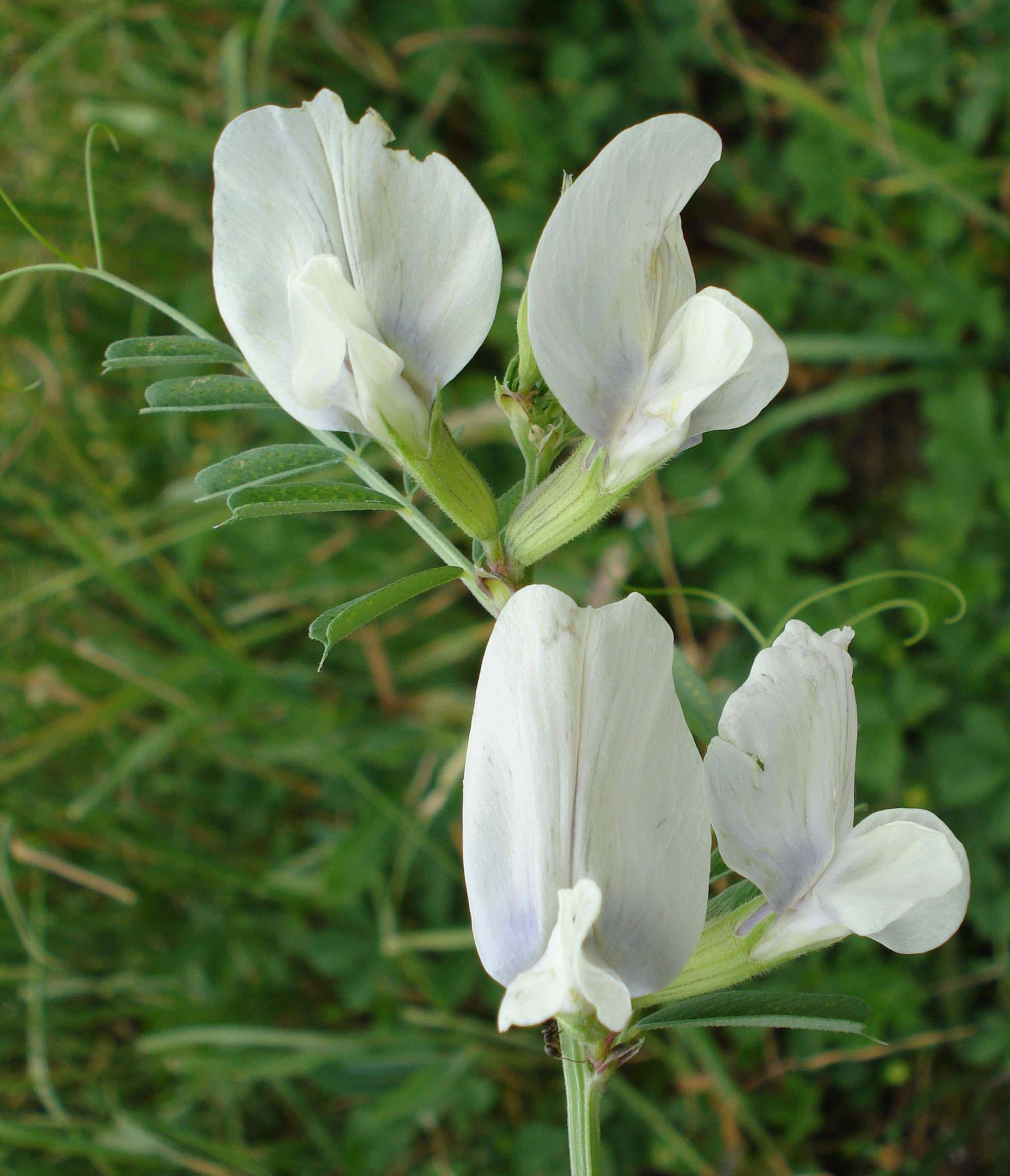 Vicia grandiflora (Unterfranken, Germany)